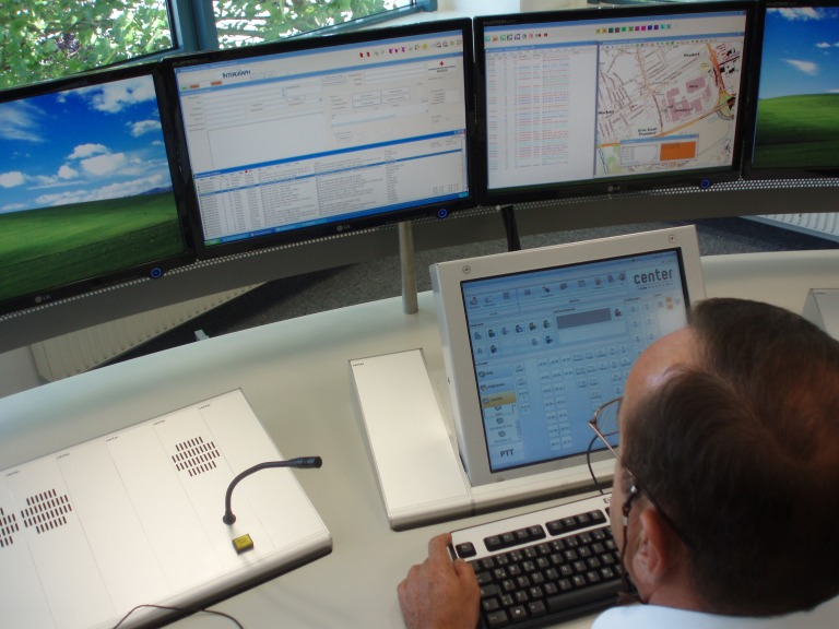 Der Arbeitsplatz einer modernen Leitstelle, Österreichisches Rotes Kreuz, Steiermark.